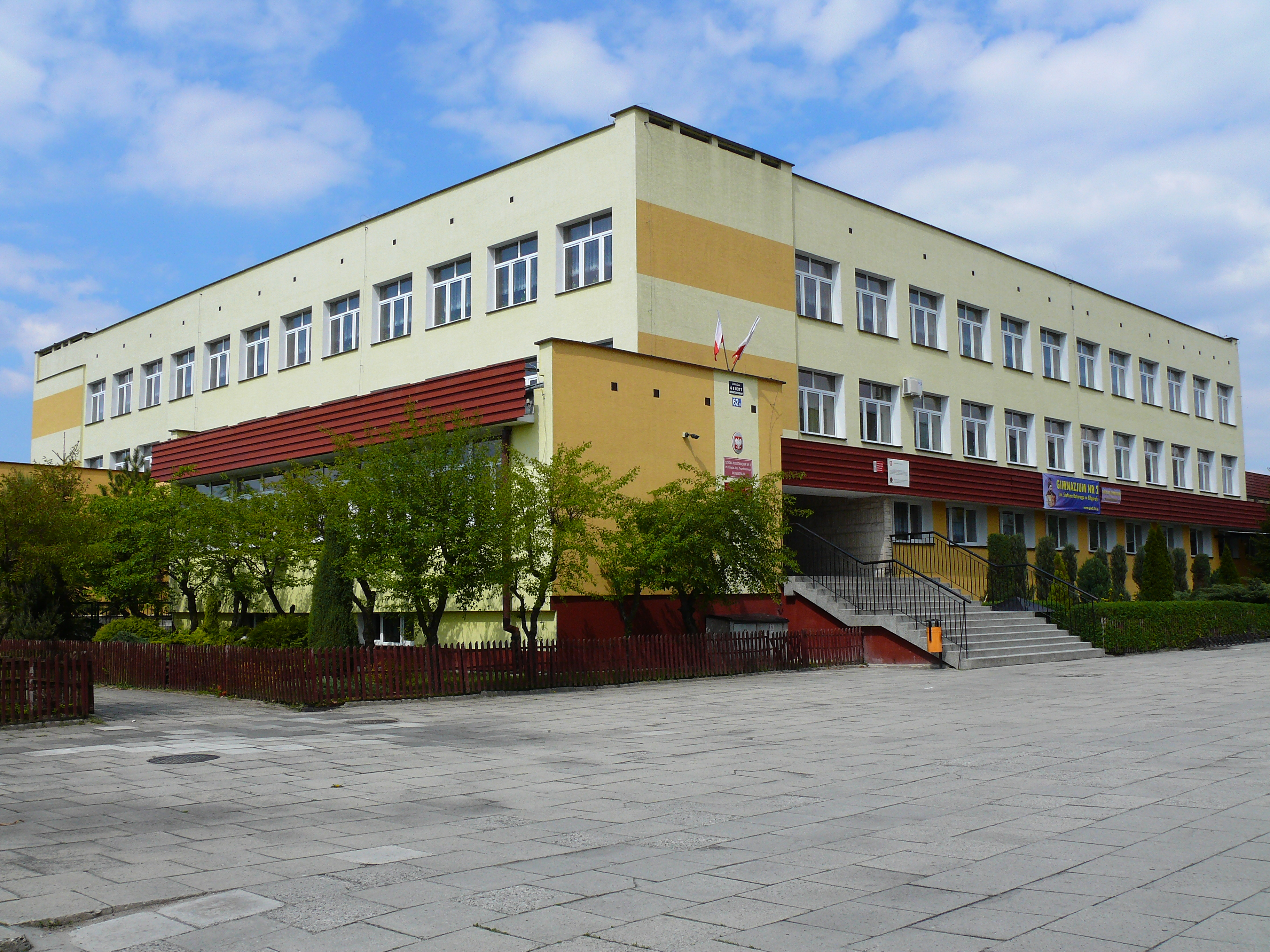 Szkoła Podstawowa nr 5 w Biłgoraju